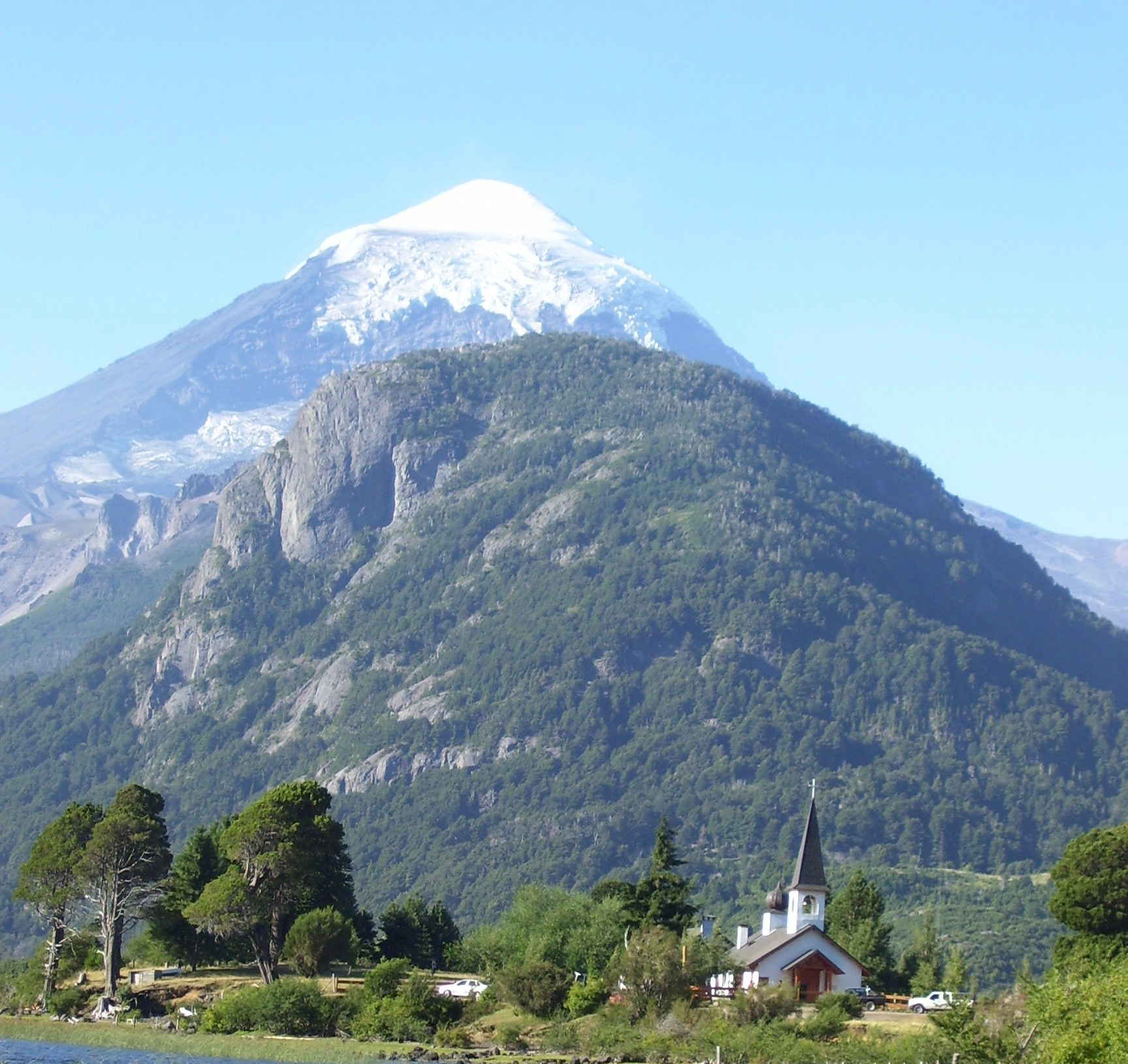 Volcán Lanín